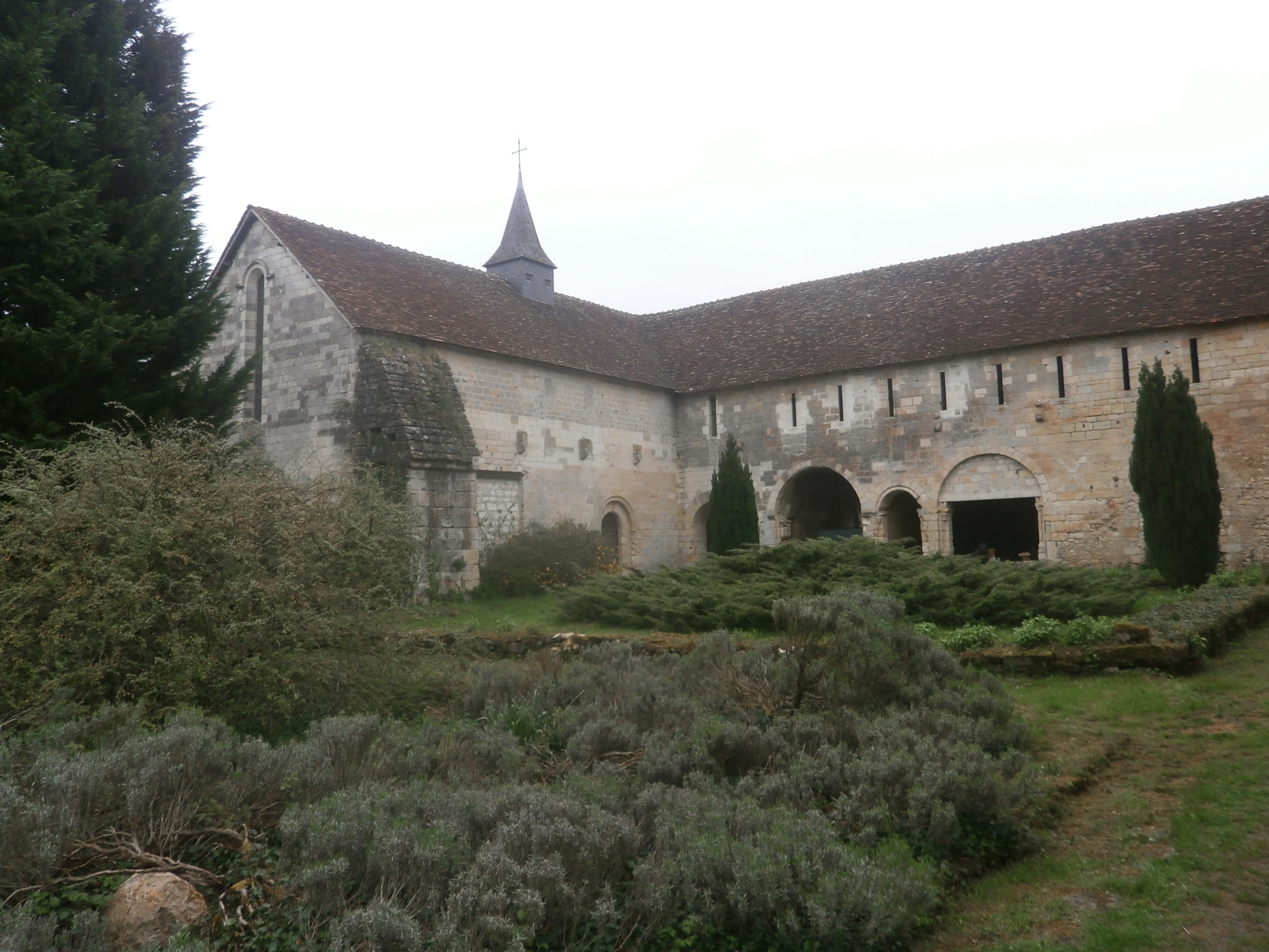 L'ancien cloître du prieuré de Villiers (Villeloin-Coulangé, Indre-et-Loire - France)